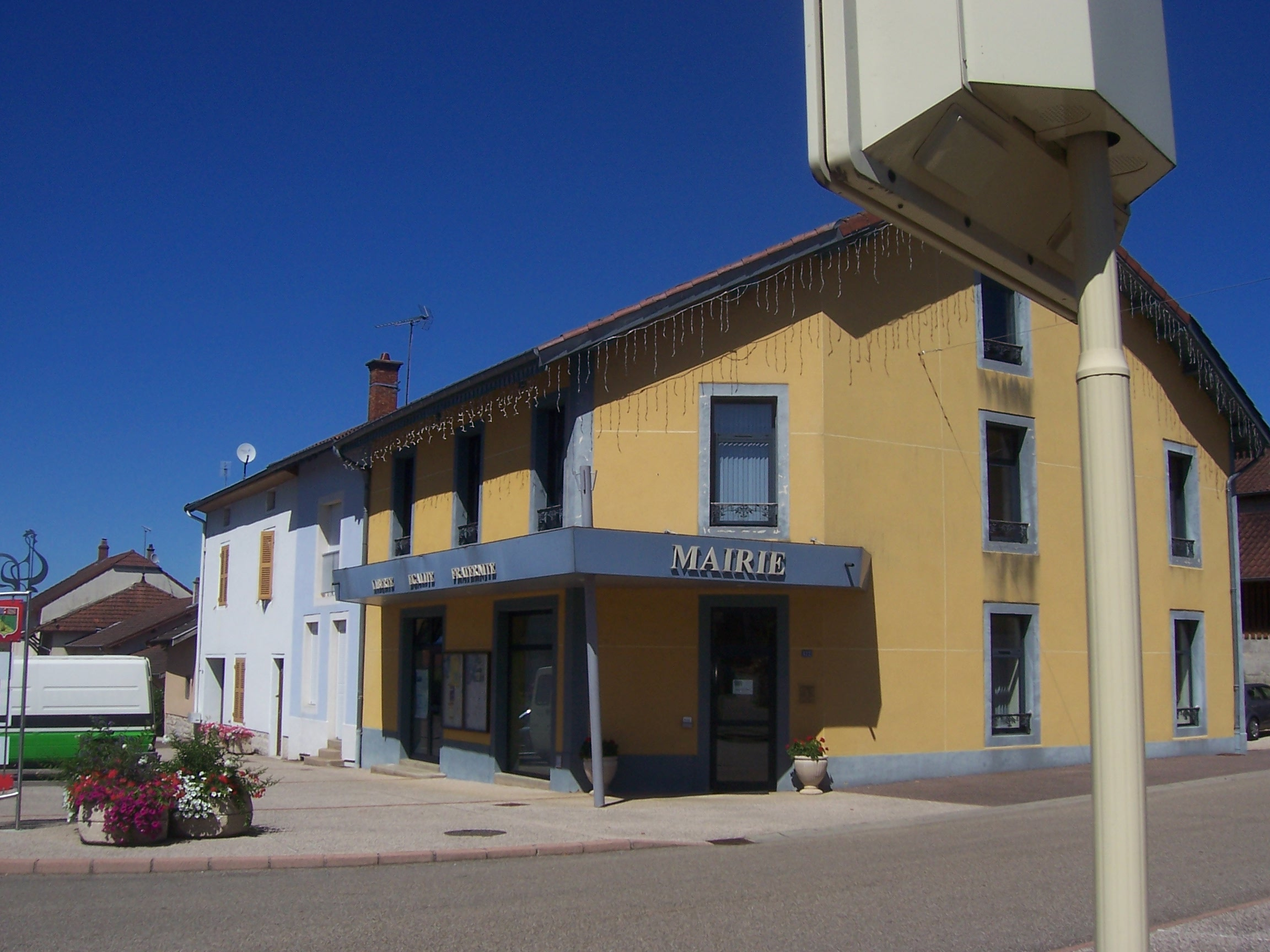 Mairie de Dommartin-lès-Cuiseaux